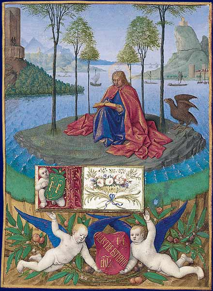 L'apôtre et évangéliste Jean aurait, selon la légende, écrit le livre de l'Apocalypse exilé sur l'île grecque de Pathmos. Il est représenté écrivant assis sur un petit îlot, un aigle, son symbole, à ses côtés. Les arbres derrières lui sont étagés de manière à créer une perspective ouverte sur un paysage imaginaire. Au premier plan, sont représentés deux putti tenant un cartouche avec une initiale et un texte aujourd'hui masqué, ainsi qu'un écu contenant le nom du commanditaire : « Maistre Estienne Ch[eva]l[ie]r » et son monogramme « EE ». Cette miniature illustrait le début des extraits des évangiles du livre d'heures.